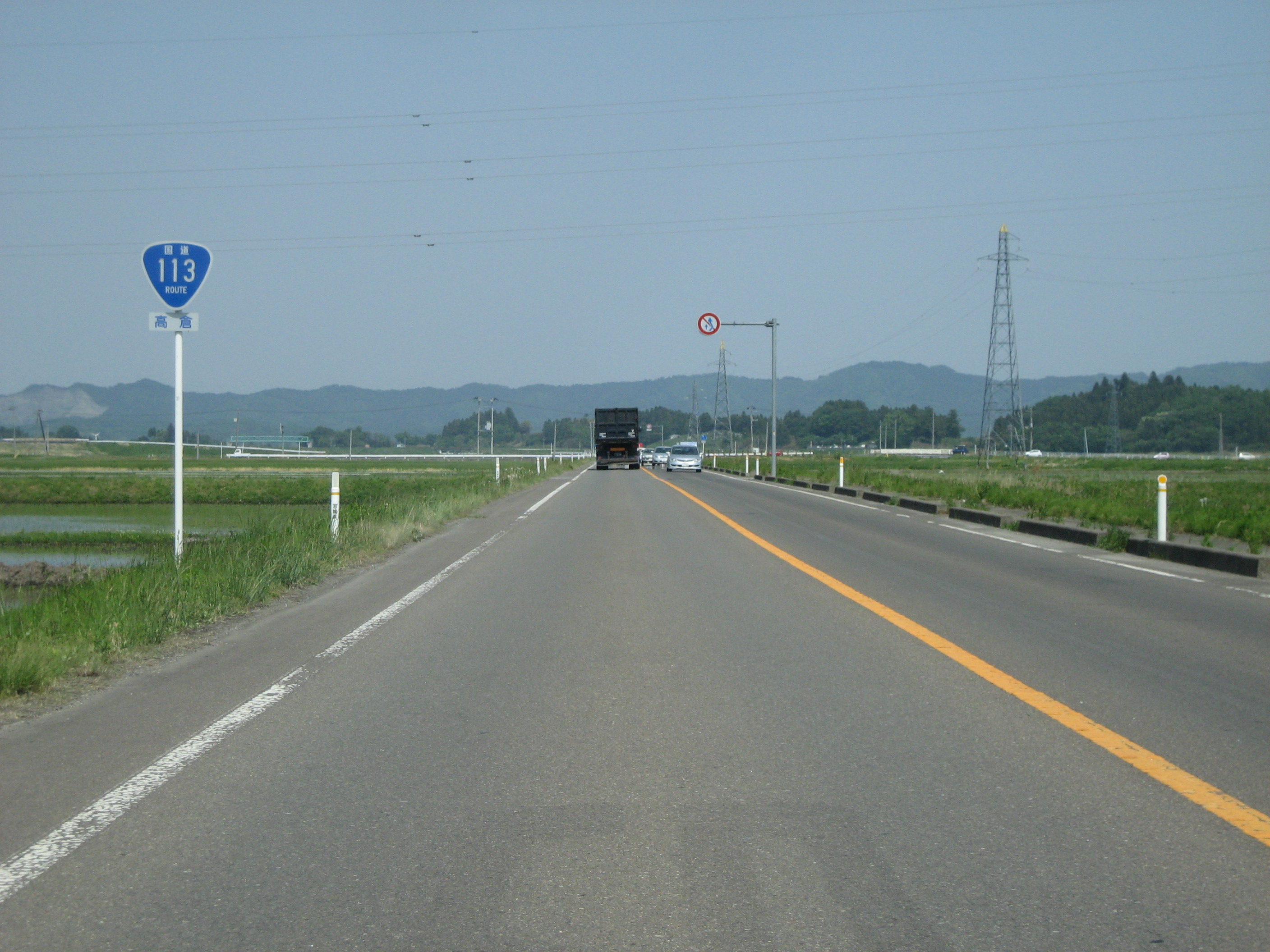 国道113号線宮城県角田市内